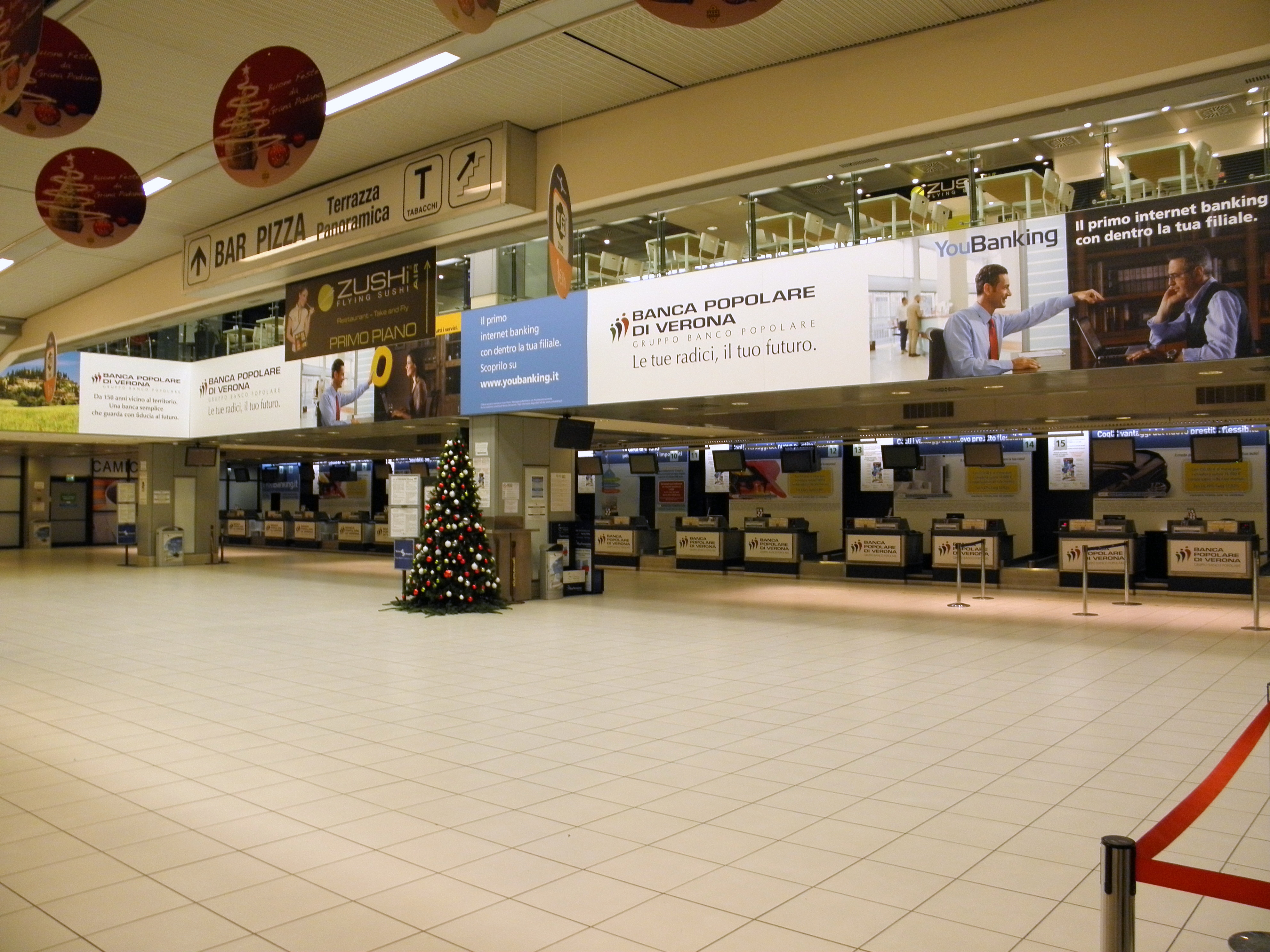 Aeroporto di Verona-Villafranca in notturna: interno del Terminal 1 (Partenze).